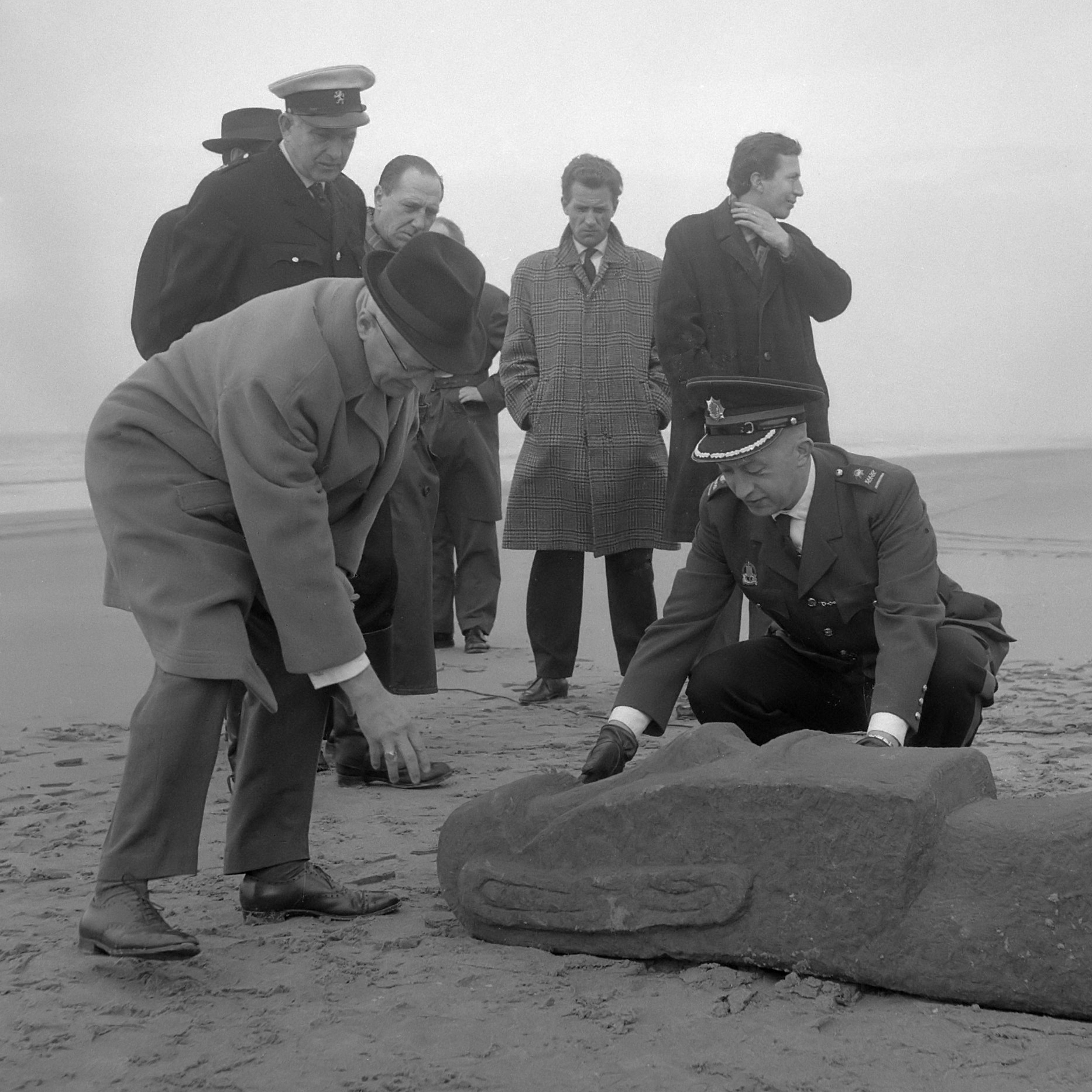 Beeld aangespoeld op Zandvoortse strand 30 maart 1962